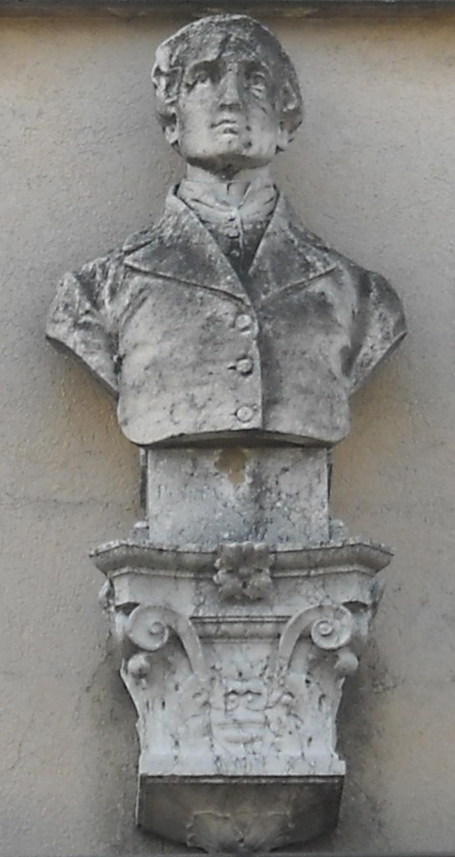 busto di Giuseppe Capparozzo